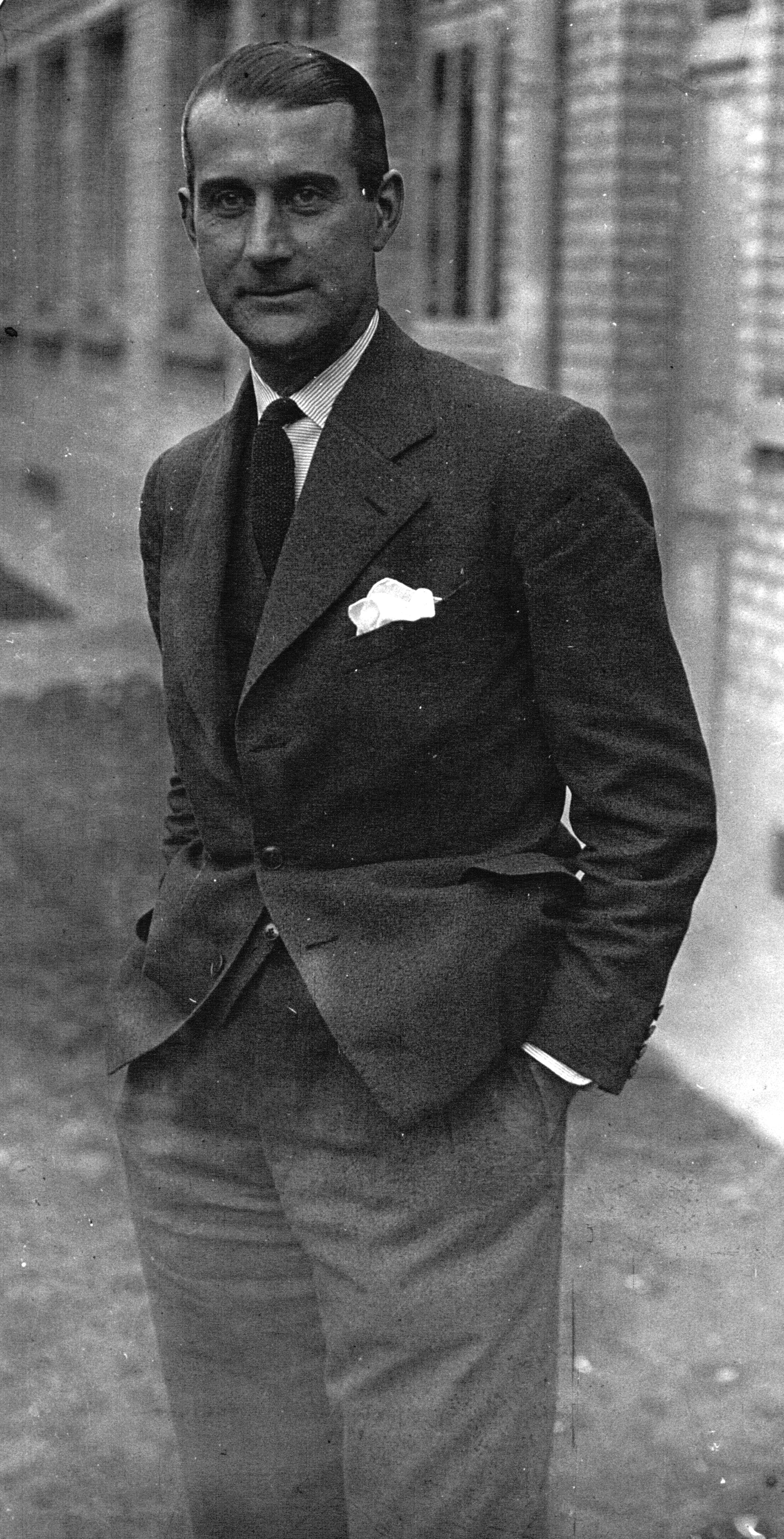 Pierre Prieur, international de hockey 1/2 corps.